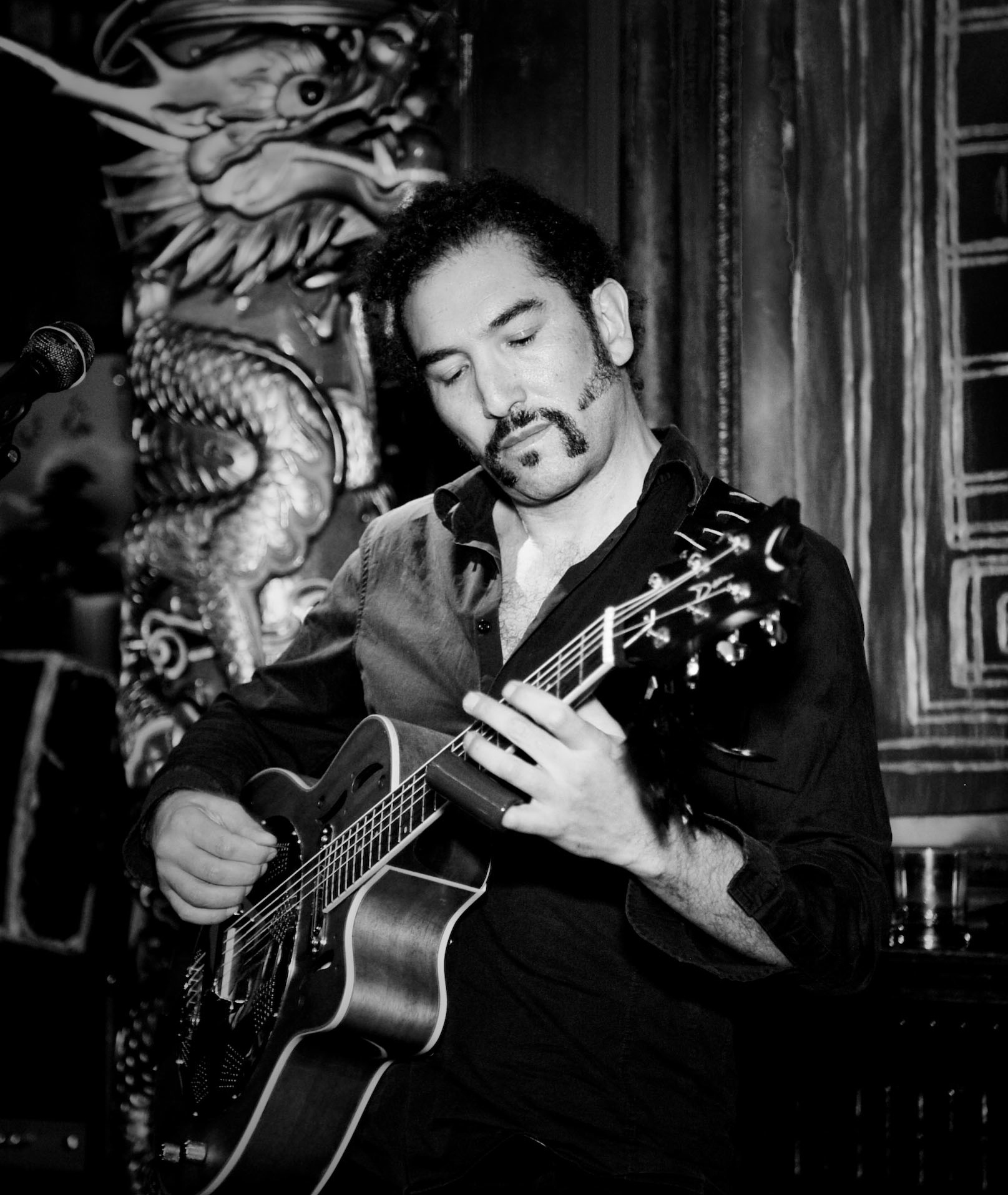 Daniel Puente Encina mit Dobro Gitarre (2013)